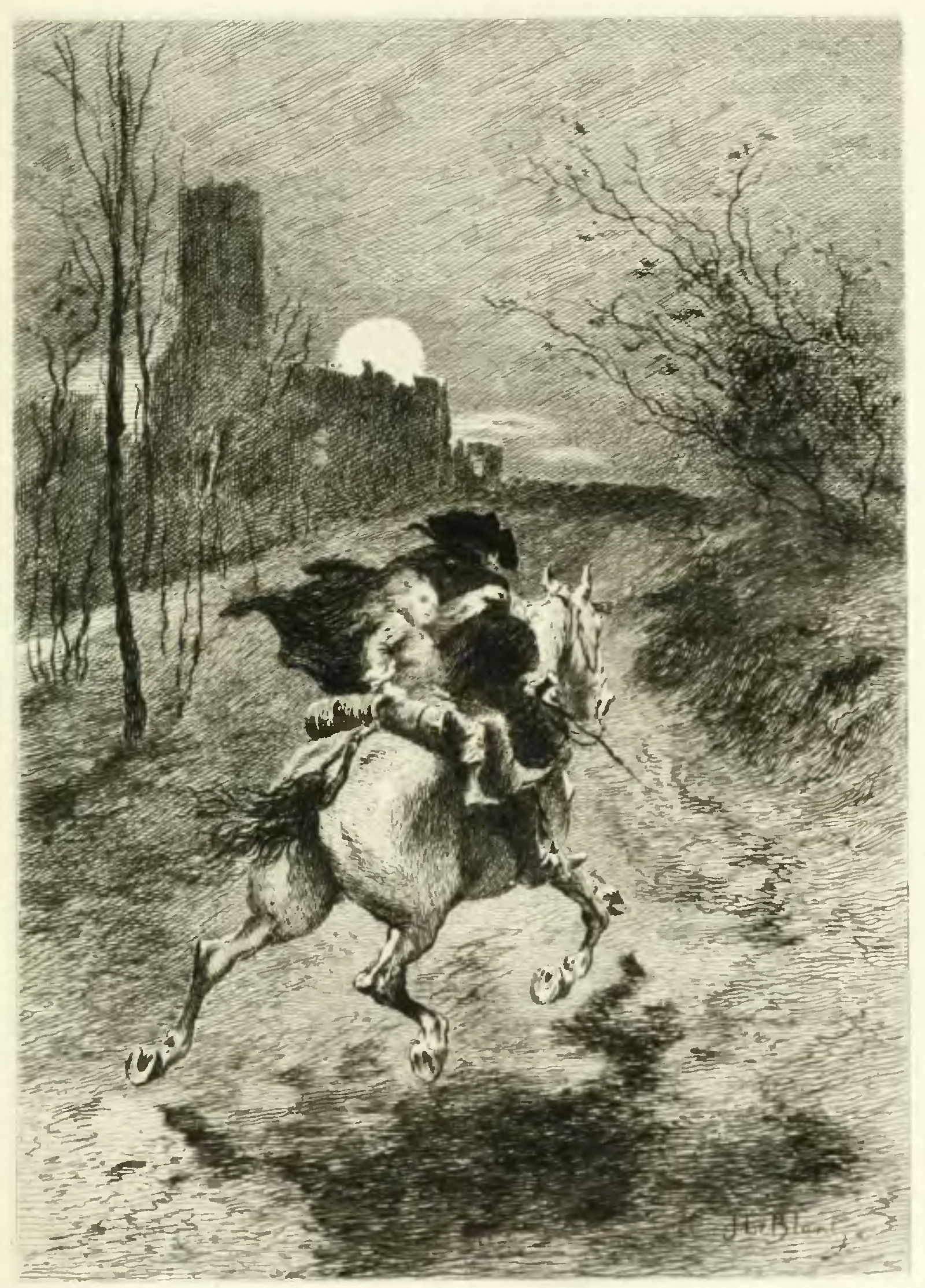 George Sand Mauprat Dix compositions par le Blant gravées à l'eau forte par H. Toussaint Collection Calmann Lévy A. Quantin, imprimeur-éditeur 1886 1886